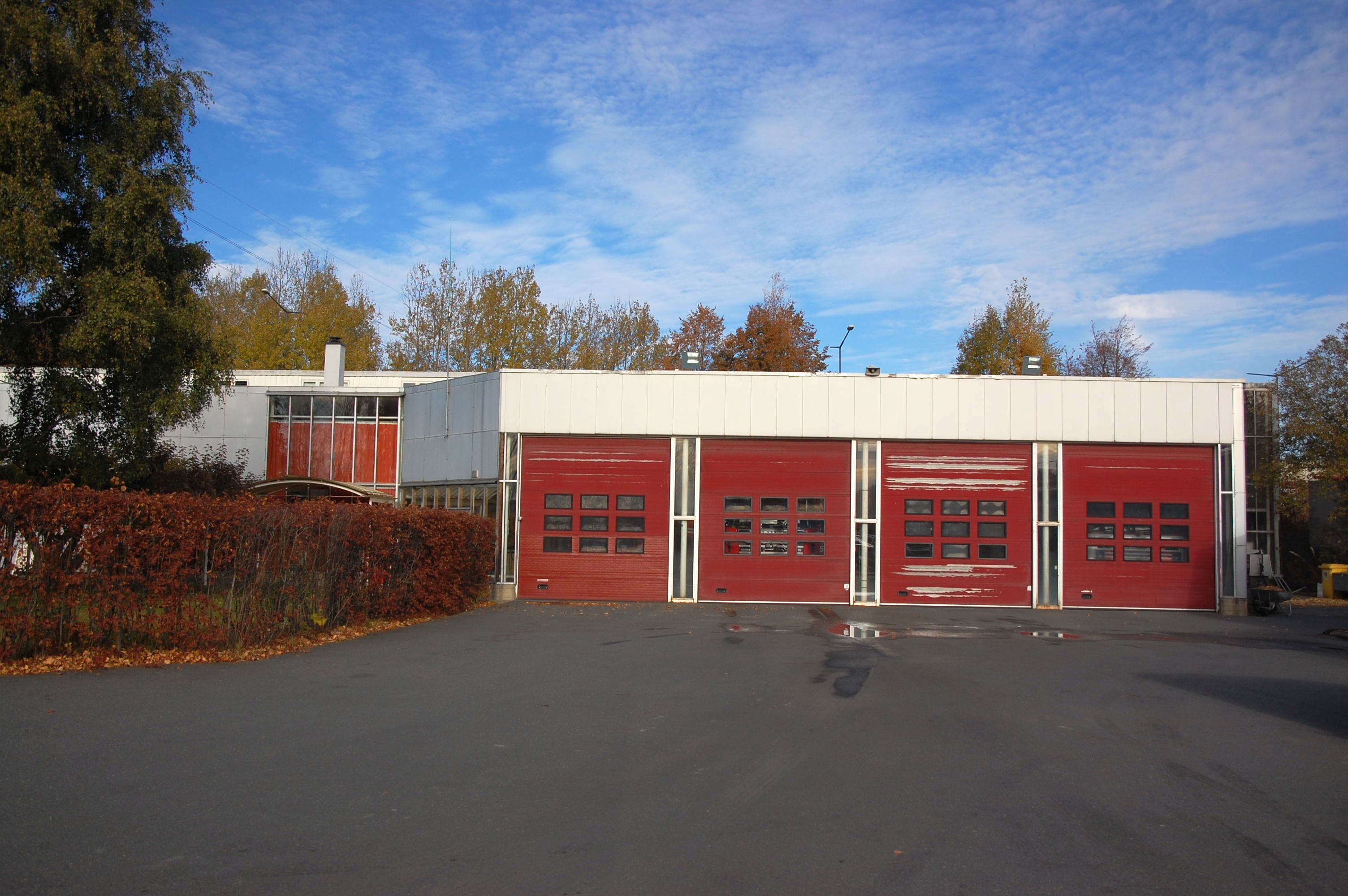 Grorud brannstasjon i Fossumveien 75, Oslo. Stasjonen, som er utført i betong, stål, aluminiumsplater og glass, er tegnet av arkitektene Odd-Kjeld Østbye, Tore Kleven og Øyvind Almaas. Den ble belønnet av Anton Christian Houens fond (Houens diplom) for god arkitektur i 1975.